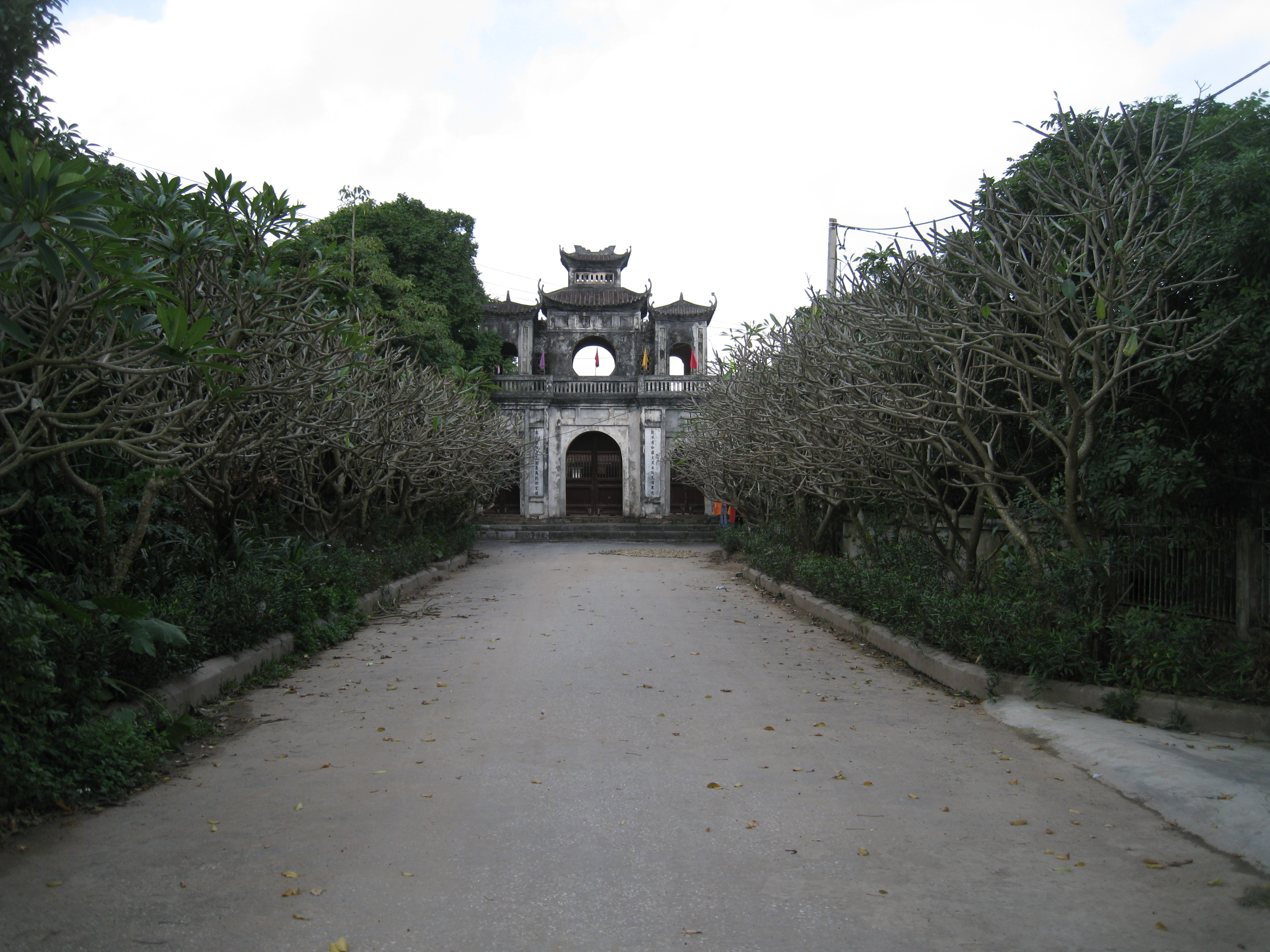 Văn miếu Xích Đằng.